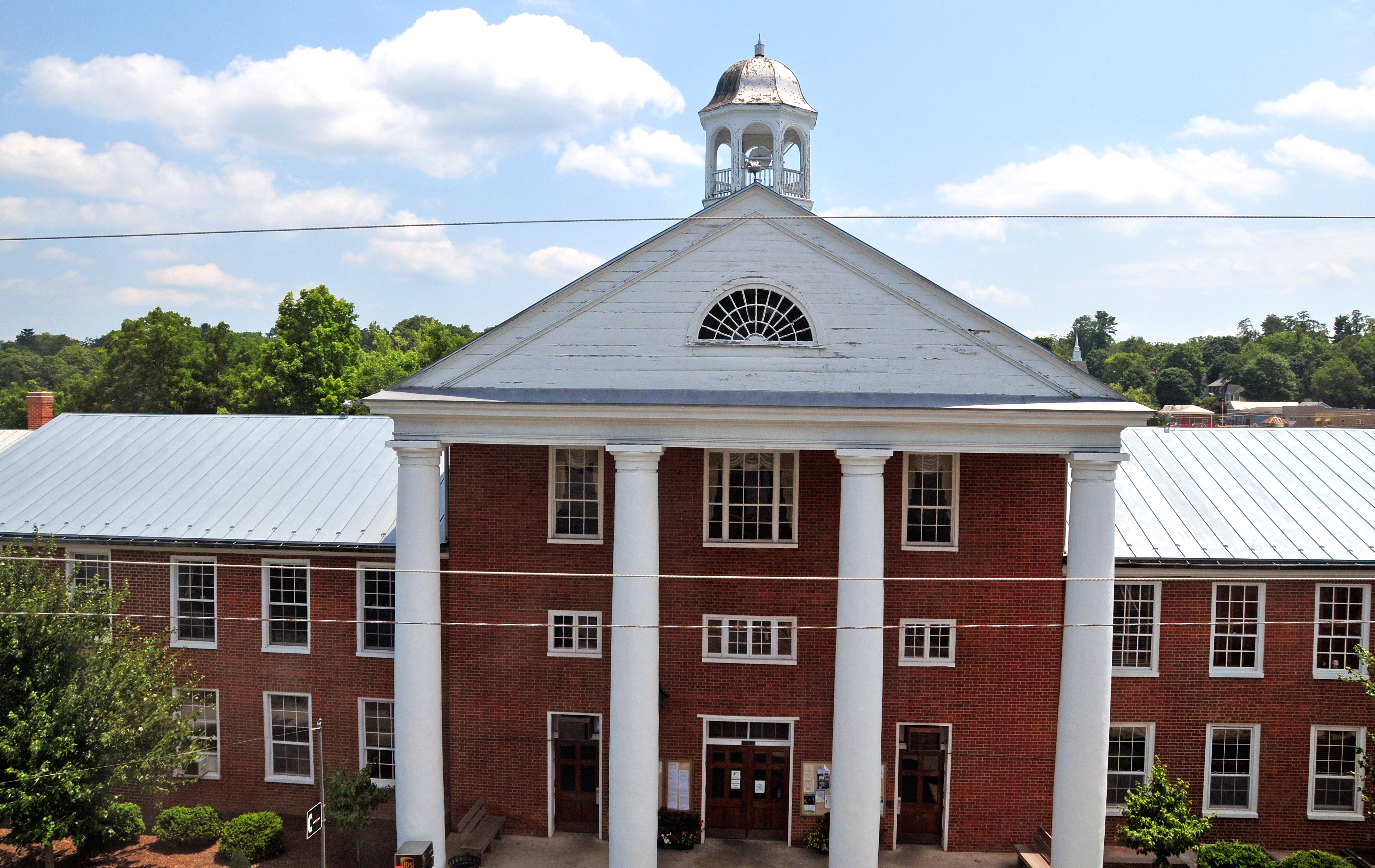 Taken in Lewisburg, West Virginia